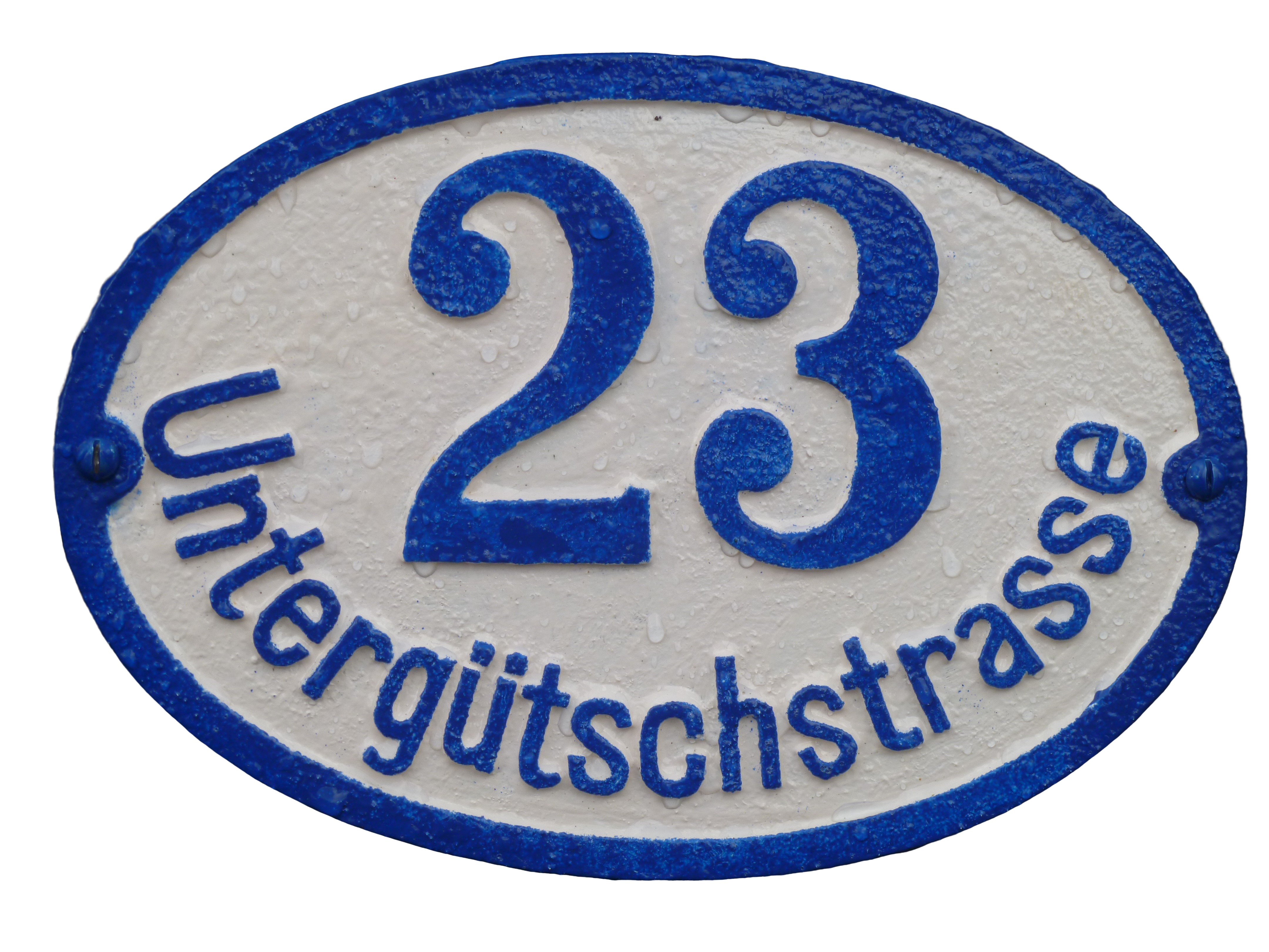 Strassenbezeichnung, Hausbezeichnung Untergütschstrasse 23